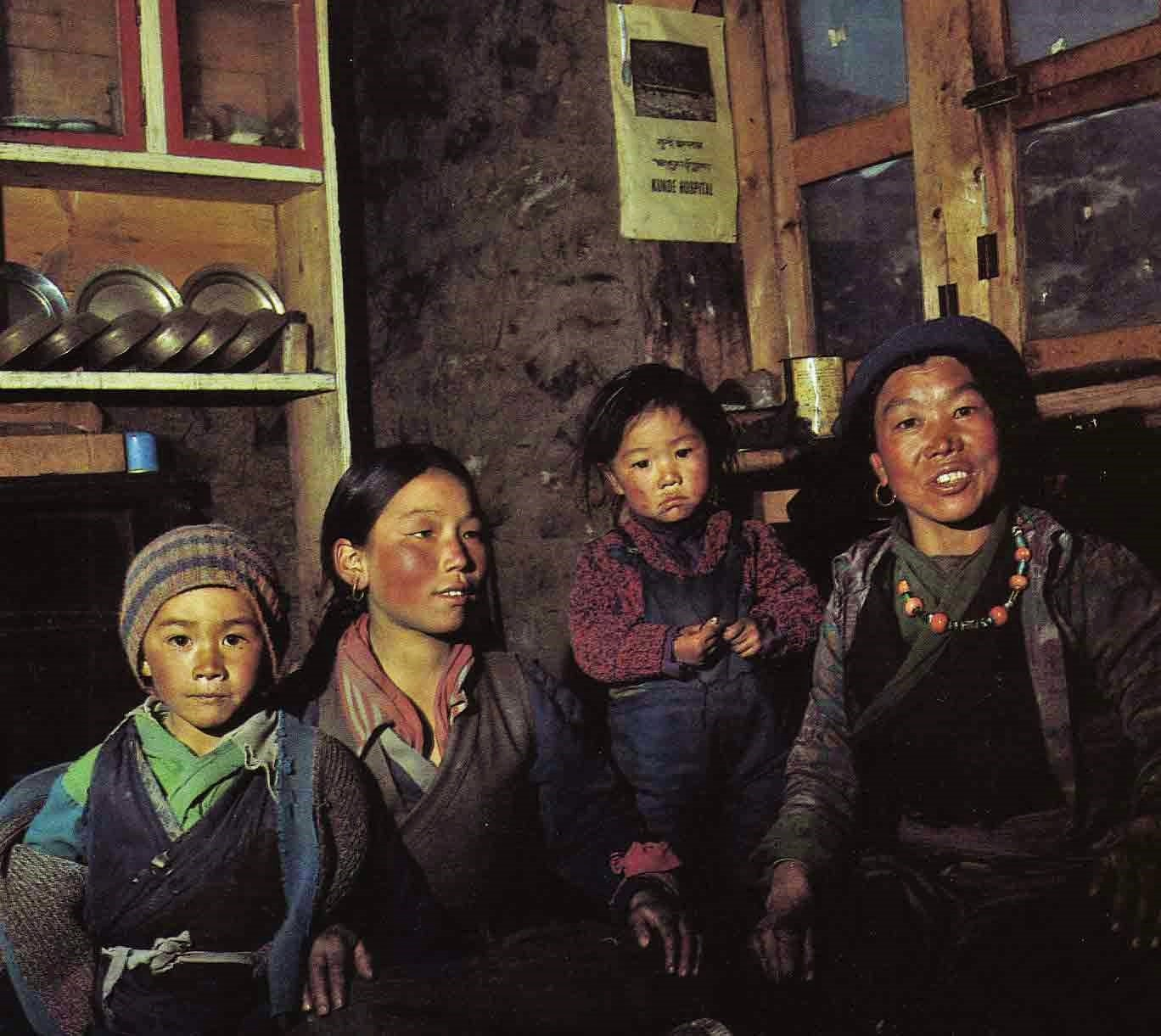 Sherpa-Famiglia Foto di personale proprietà, concessa in Sherpa